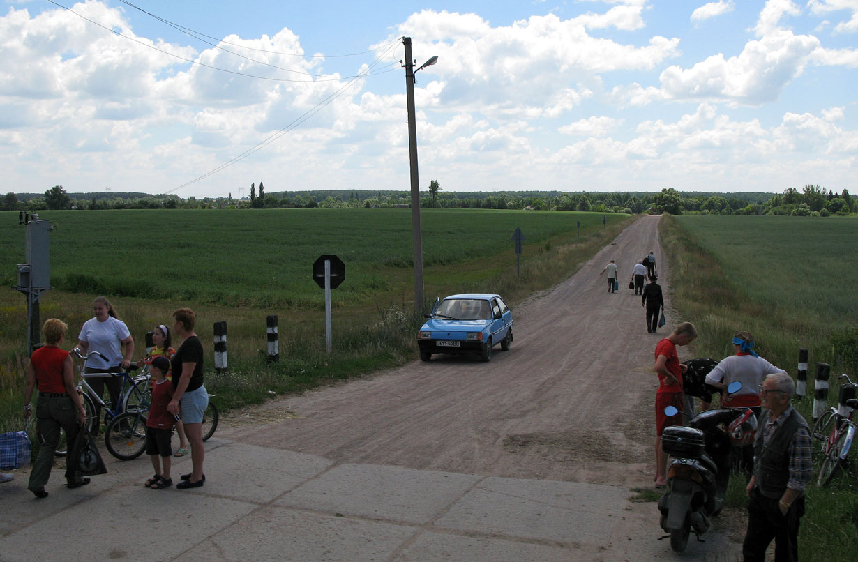 Залізничний переїзд біля з.п. Лотос. Вид з поїзда